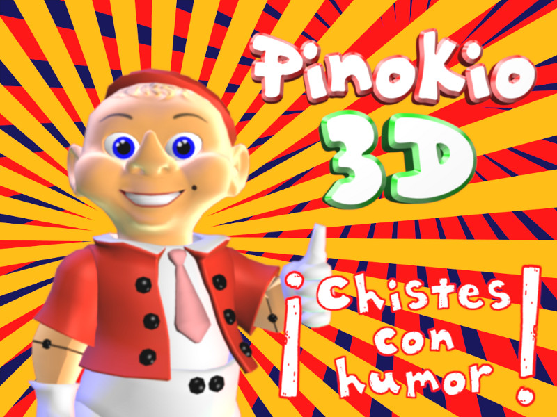 Pinokio 3D, una Marioneta Digital, creada por Mario Mey.